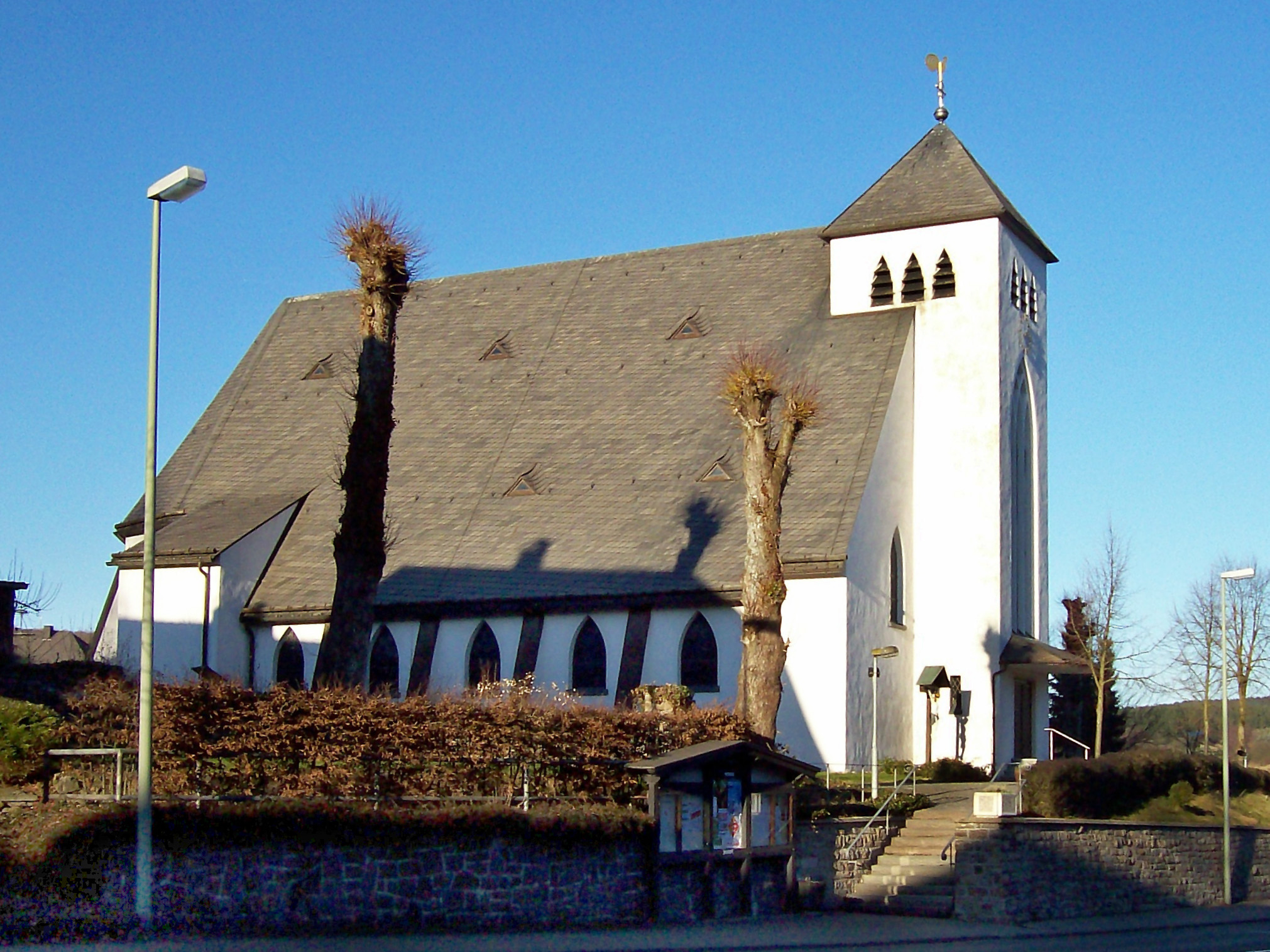 Pfarrkirche, St. Nikolaus, Eslohe-Cobbenrode (Germany)